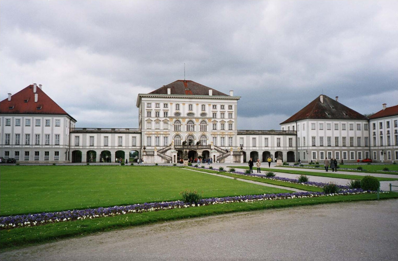 Schloss Nymphenburg, München. Nymphenburg Palace, Munich, Bavaria.